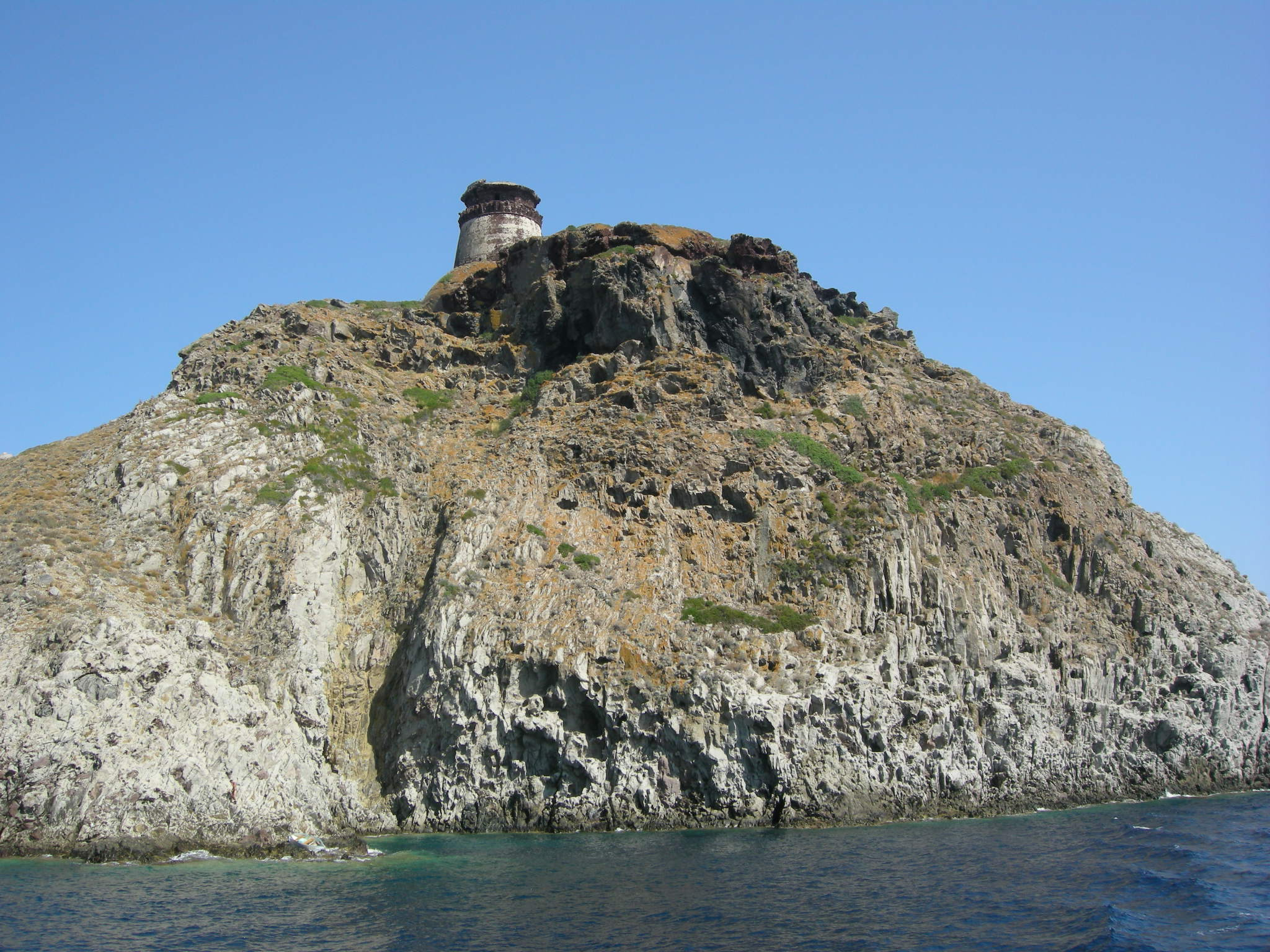 Capraia, giro periplo 88 capitello dello zenobito 09 torre dello zenobito